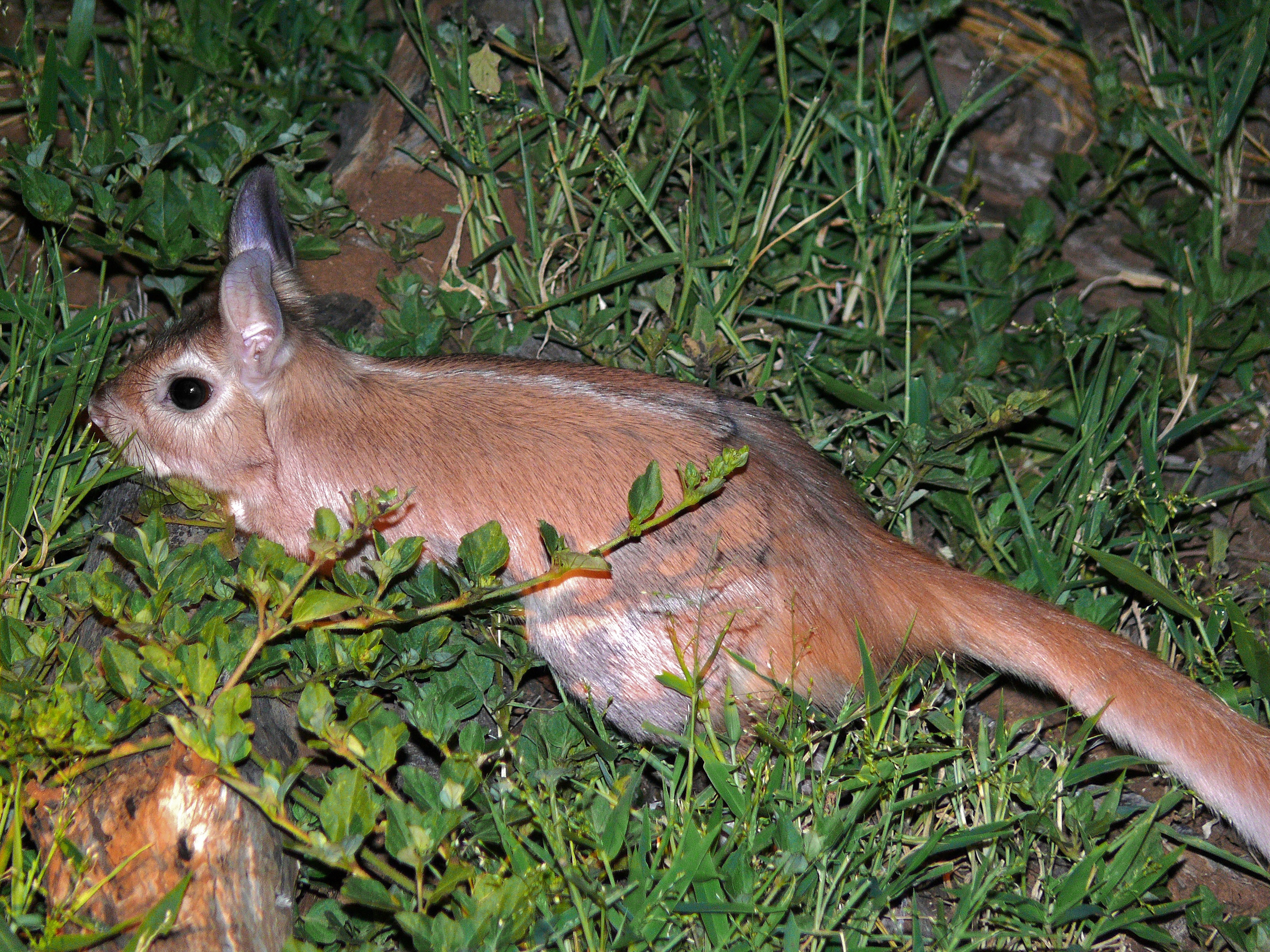 Letaba Night Drive, Kruger NP, SOUTH AFRICA